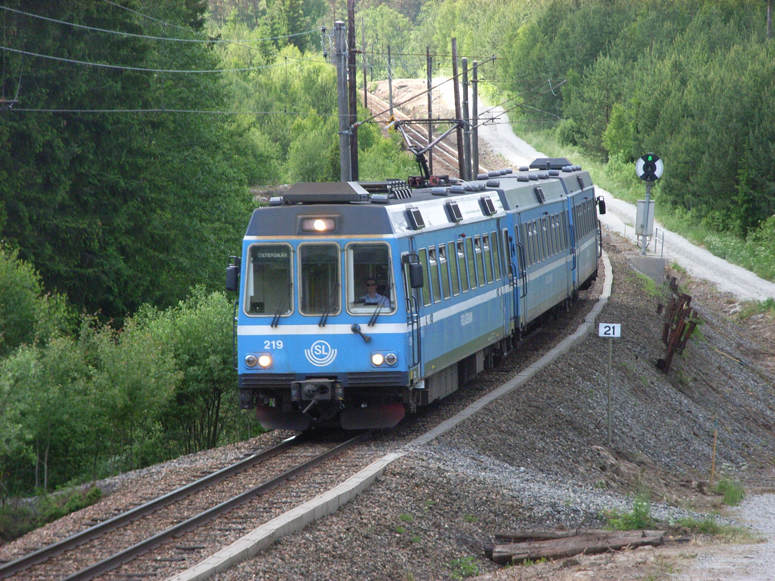 X10p-tåg på Roslagsbanan, norr om Rydbo